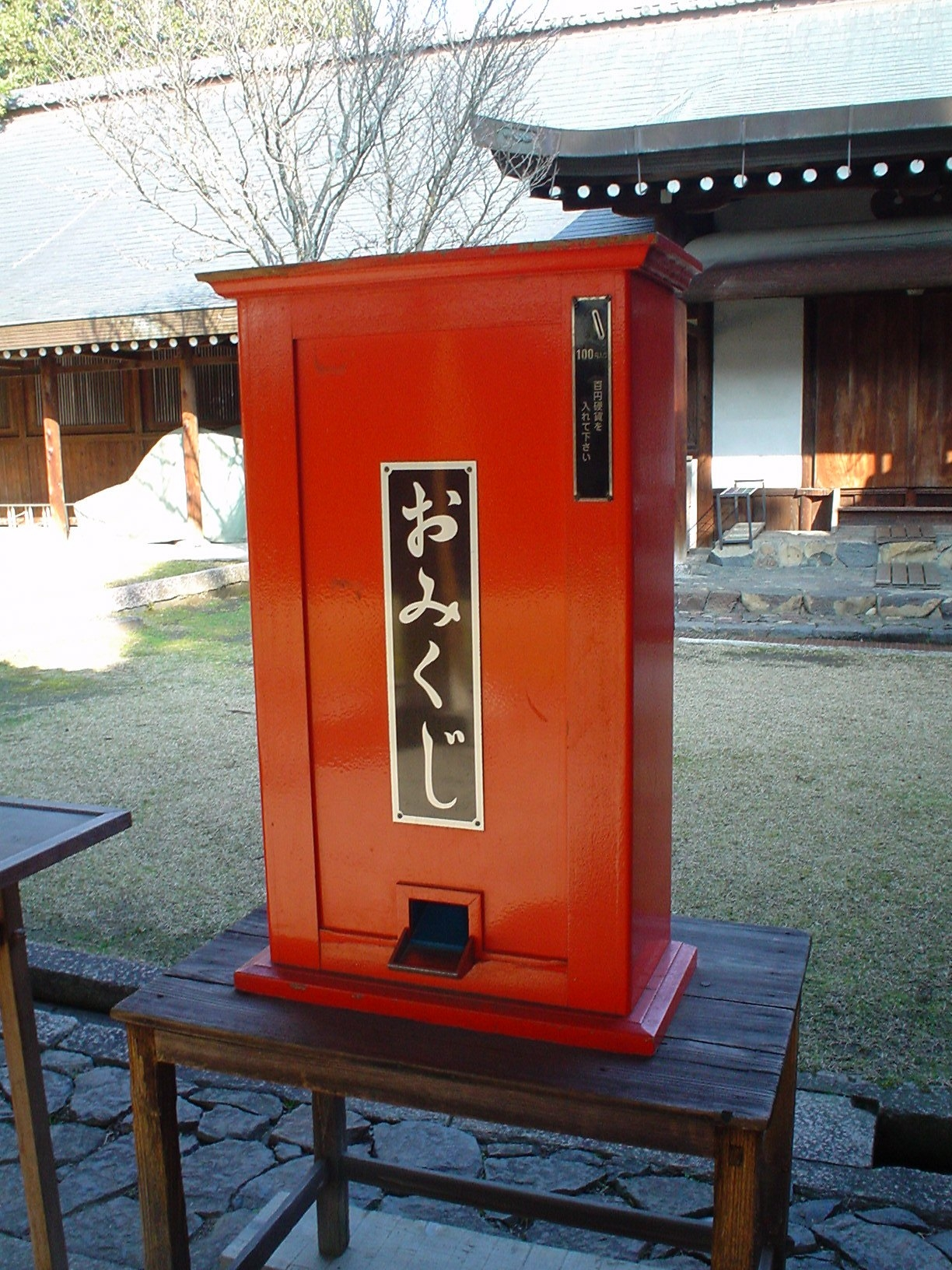 Omikuji vending machine at Himuro Shine, Nara, Nara, Japan おみくじ自動販売機（奈良市氷室神社）